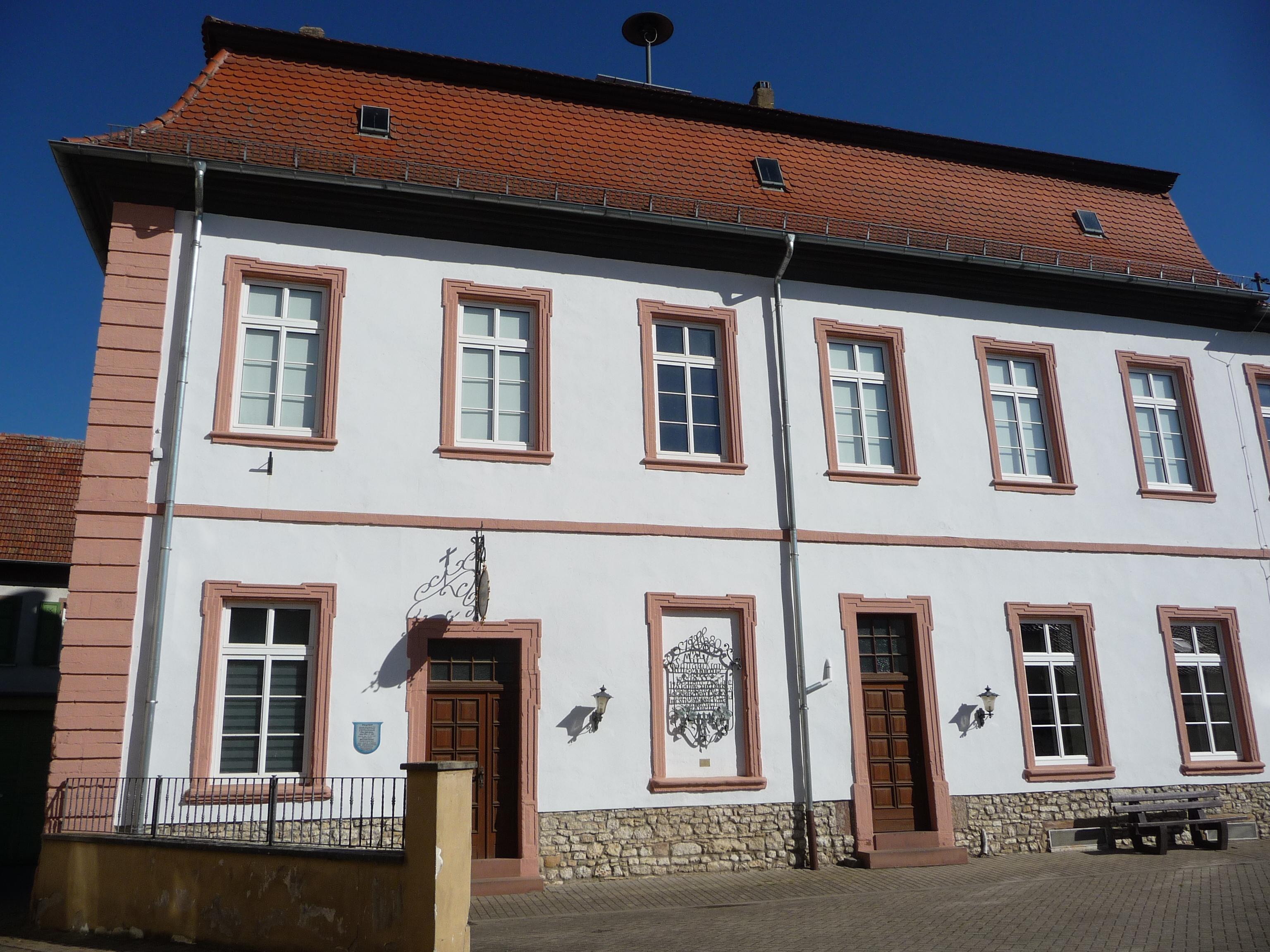 Von der Deutschordenskommende Ober-Flörsheim blieben das barocke, schlossartige Komturhaus, die gegenüber liegende Schaffnerei, ein mittelalterlicher Torturm und Reste der Wehrmauern des Kommendenbezirks erhalten.